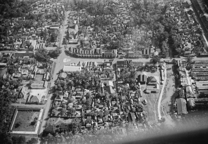 negatief. Luchtfoto van Denpasar